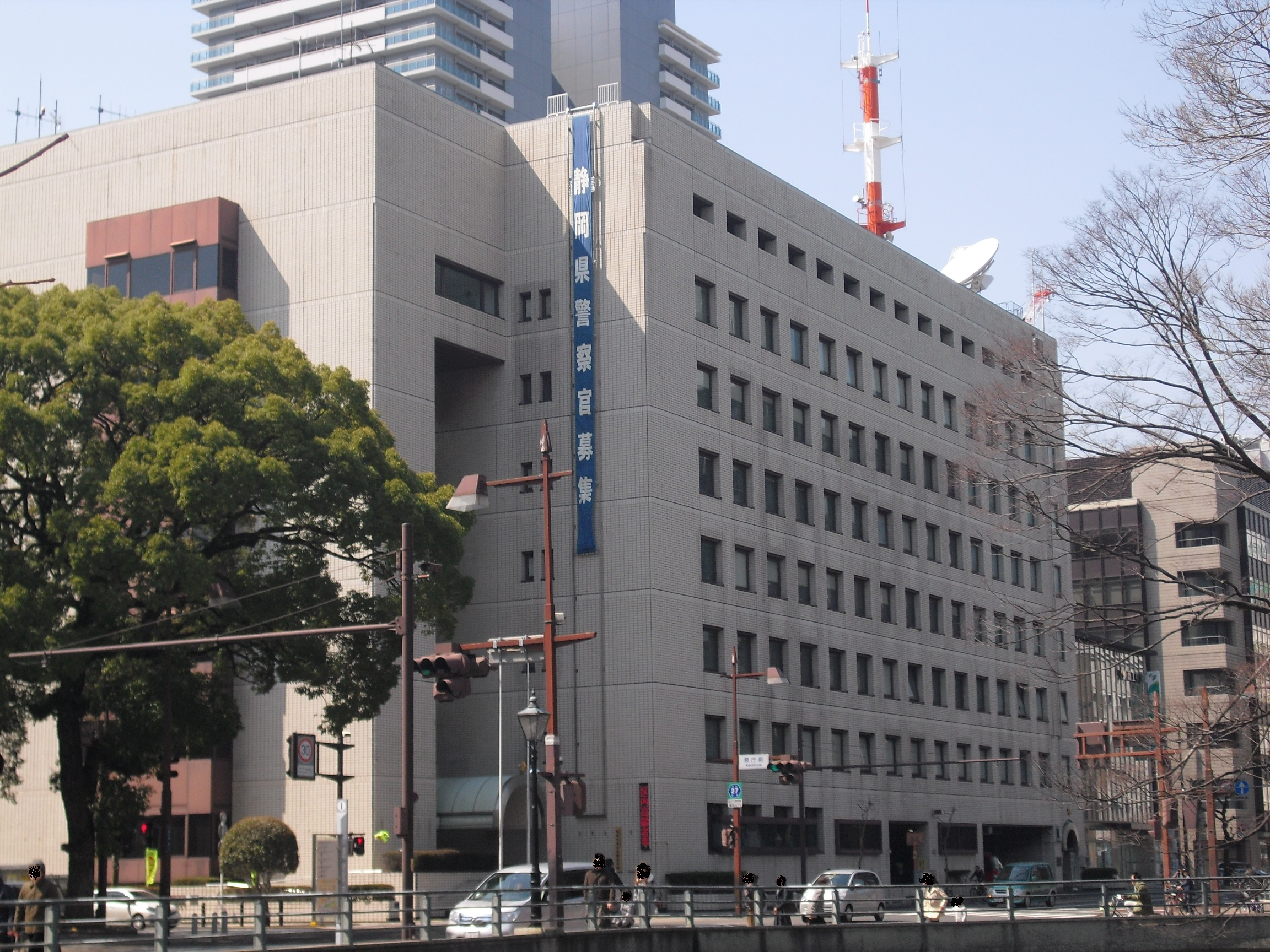 静岡中央警察署